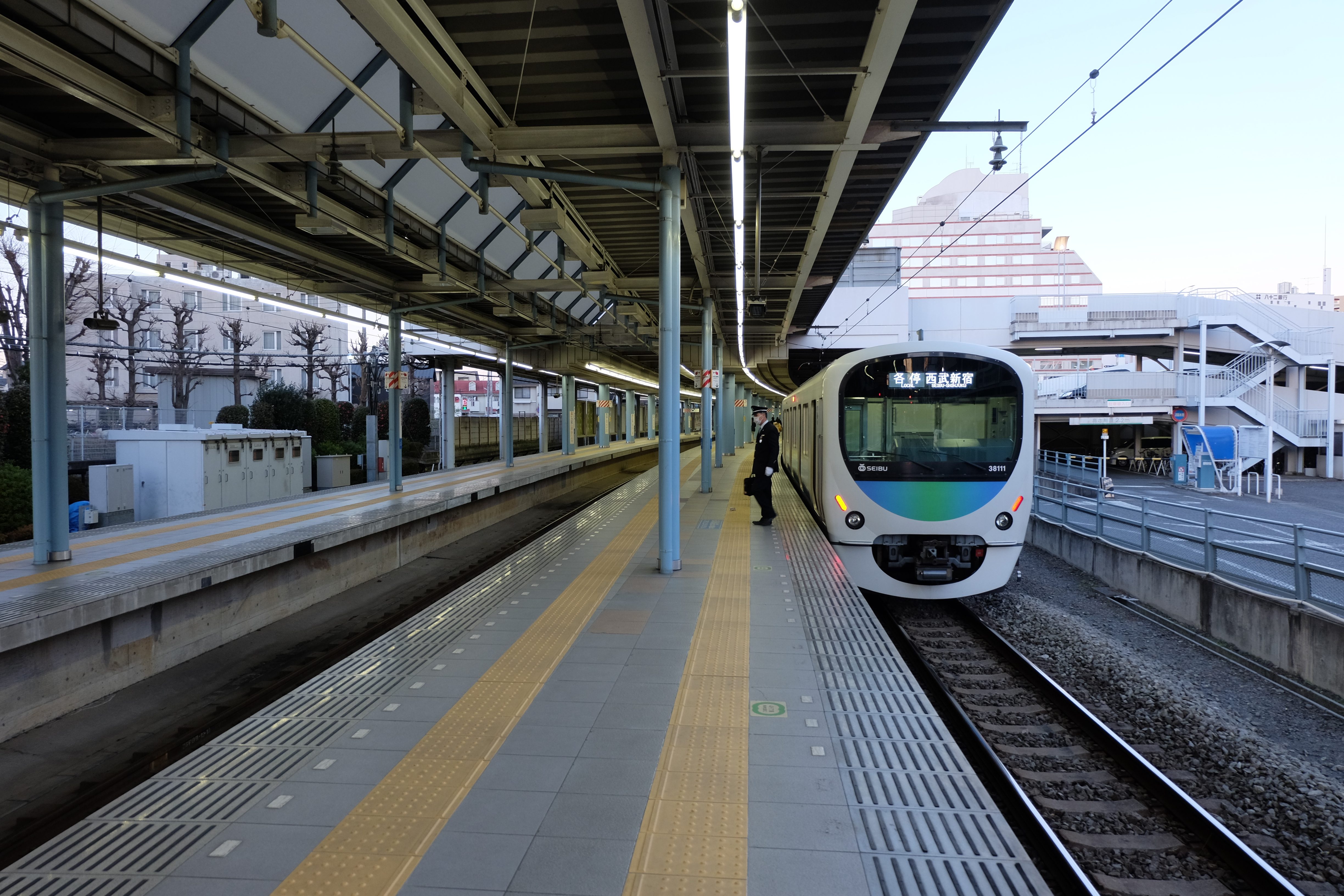 本川越駅 駅構内の様子